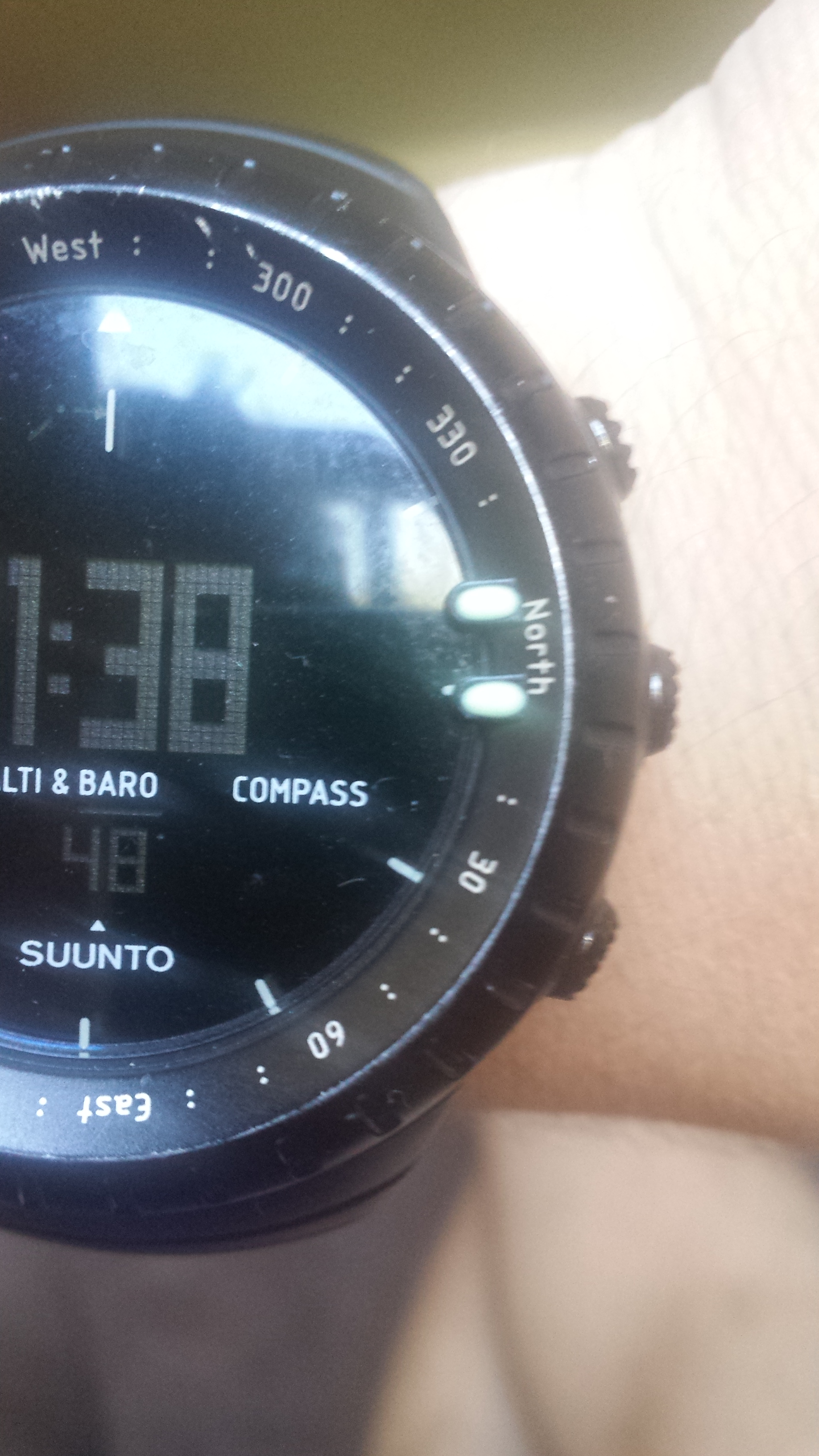 Suunto core